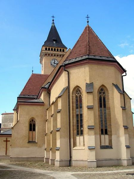 Sabinov starobylé bývalé slobodné kráľovské mesto na Slovensku. Dnes okresné mesto v regióne Šariš. Rímskokatolícky kostol Mučeníckej smrti svätého Jána Krstiteľa.